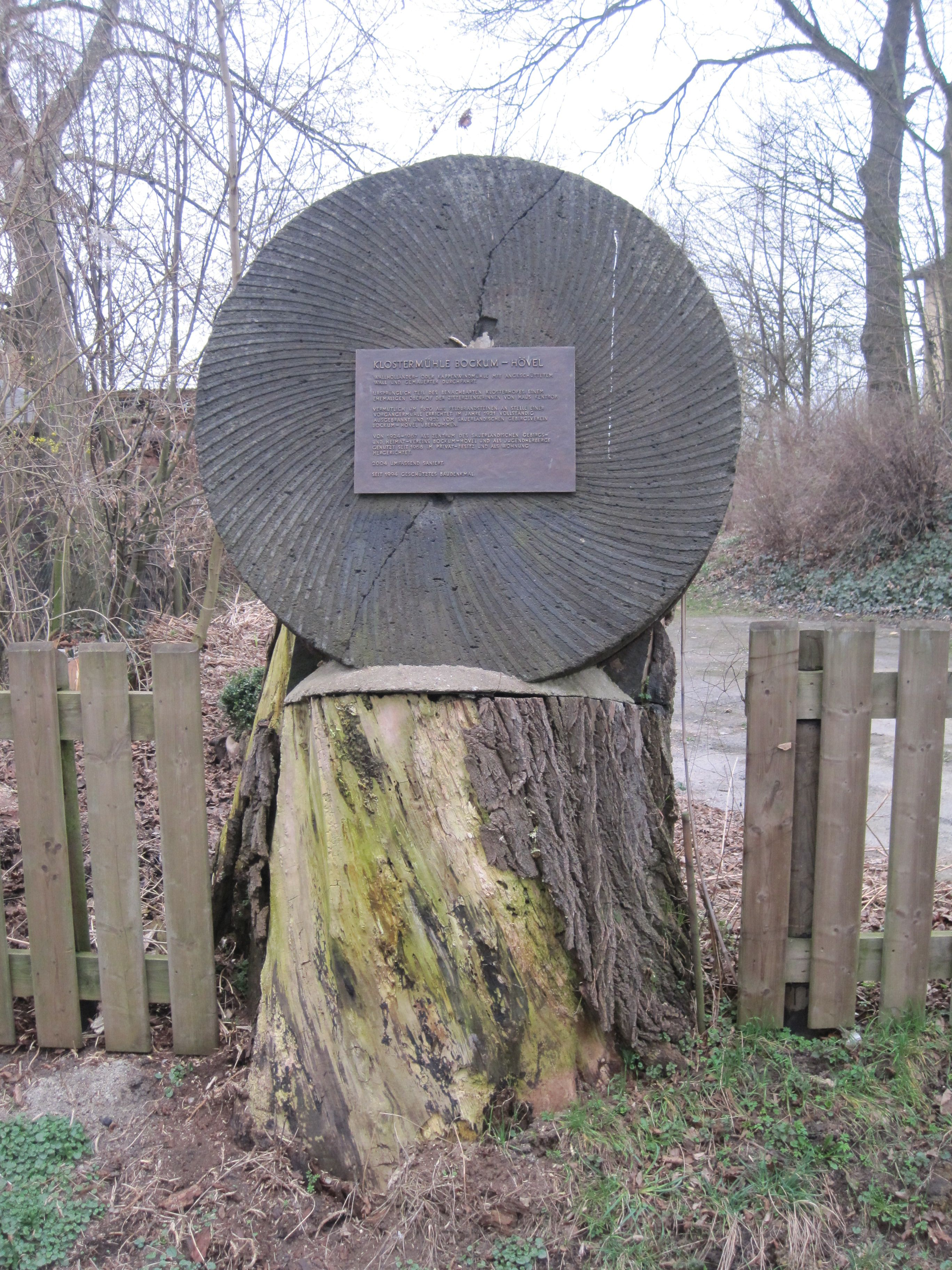 Das Foto zeigt die Informationstafel vor der Klostermühle Bockum-Hövel, Hamm/Westfalen.